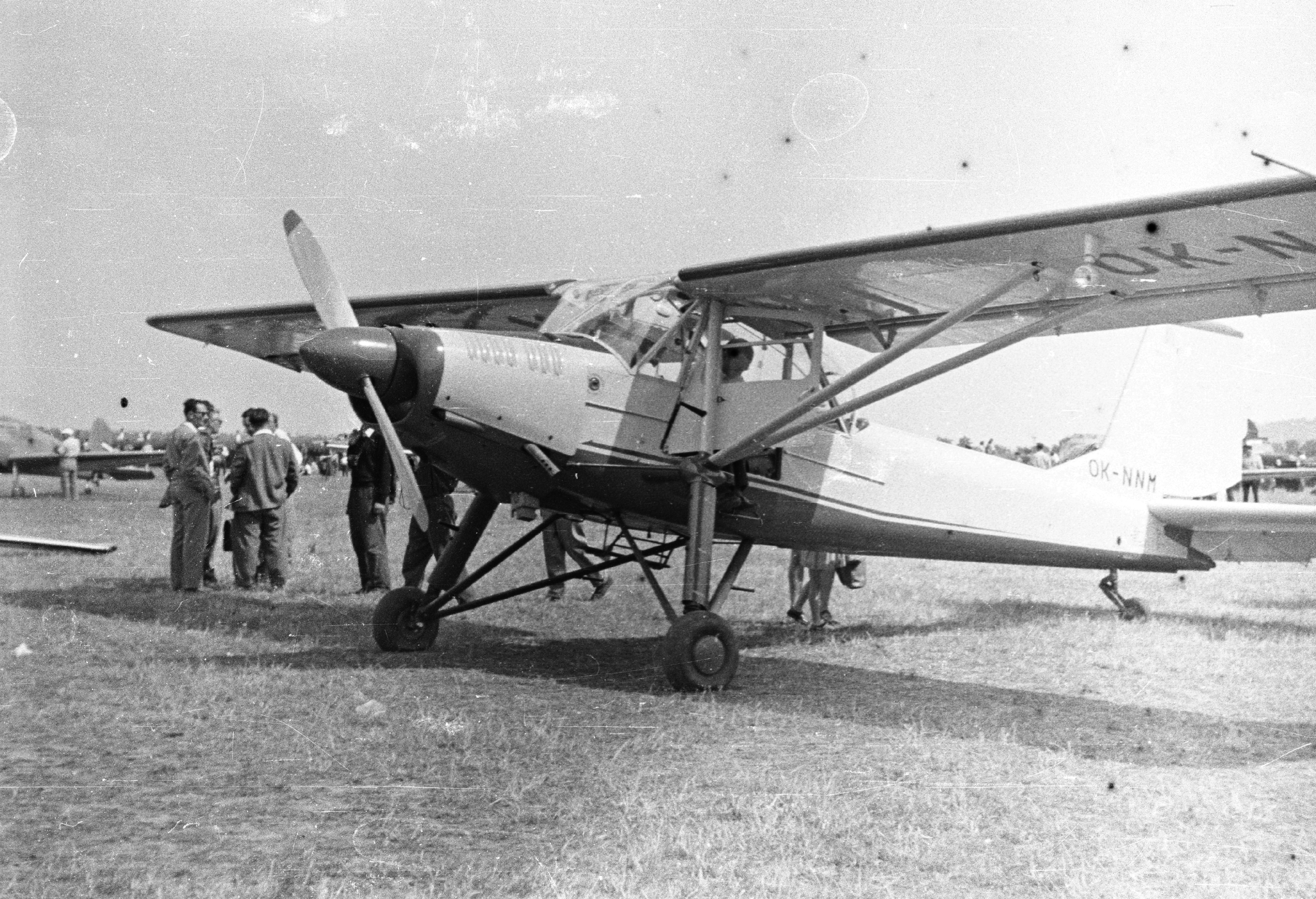 Let L-60-as Brigadyr típusú repülőgép. Location: Hungary, Budapest XI., Budaörs Airport Tags: airplane, airport, transport, Czechoslovak brand, Budapest Title: Let L-60-as Brigadyr típusú repülőgép.